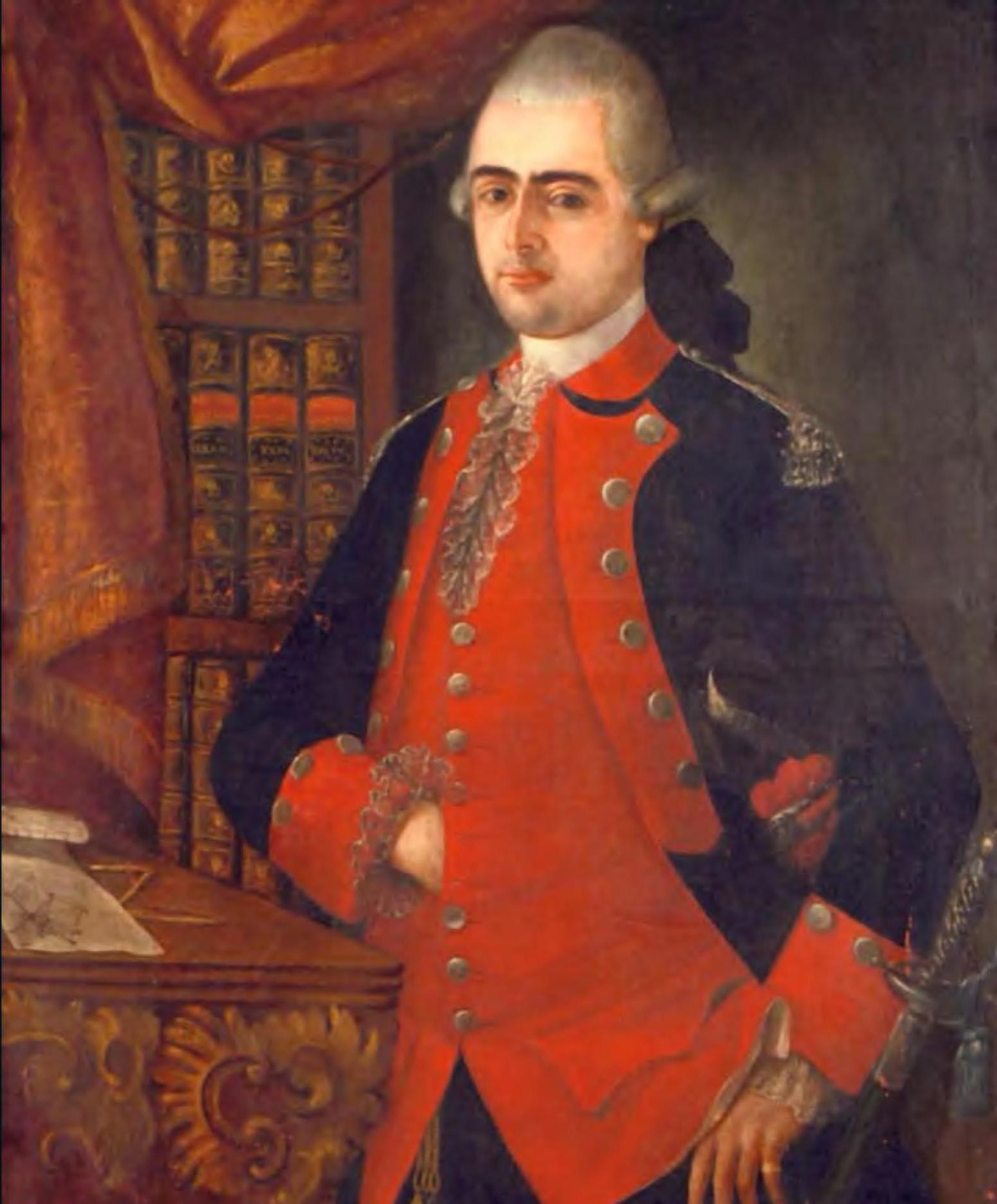 La imagen de José Antonio de Rojas, pertenece al proyecto El Diputado Bernardo Ohiggins en el Congreso de 1811